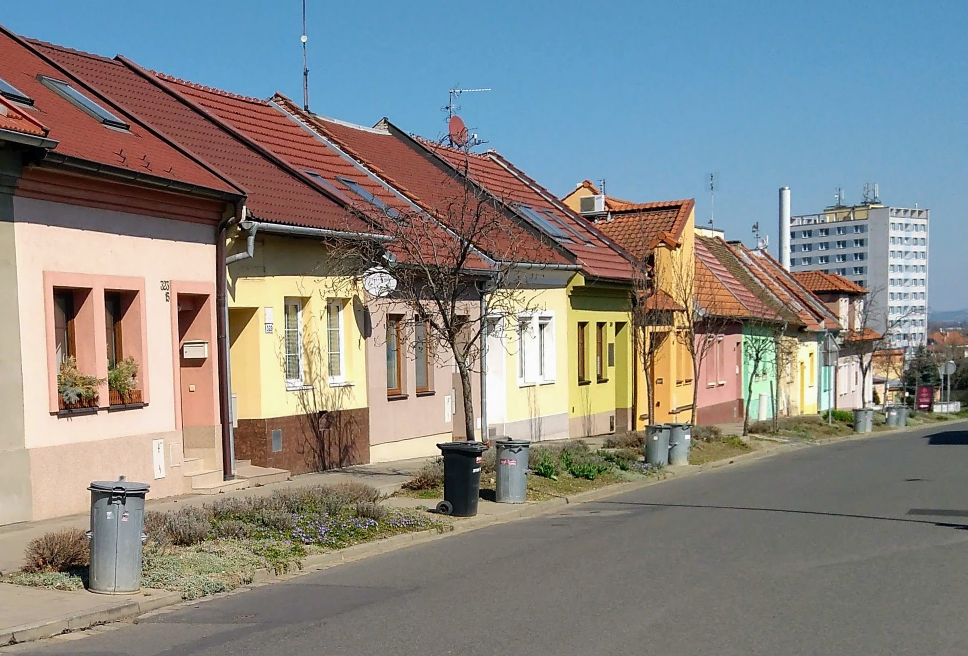 Oskol - ulice v Kroměříži